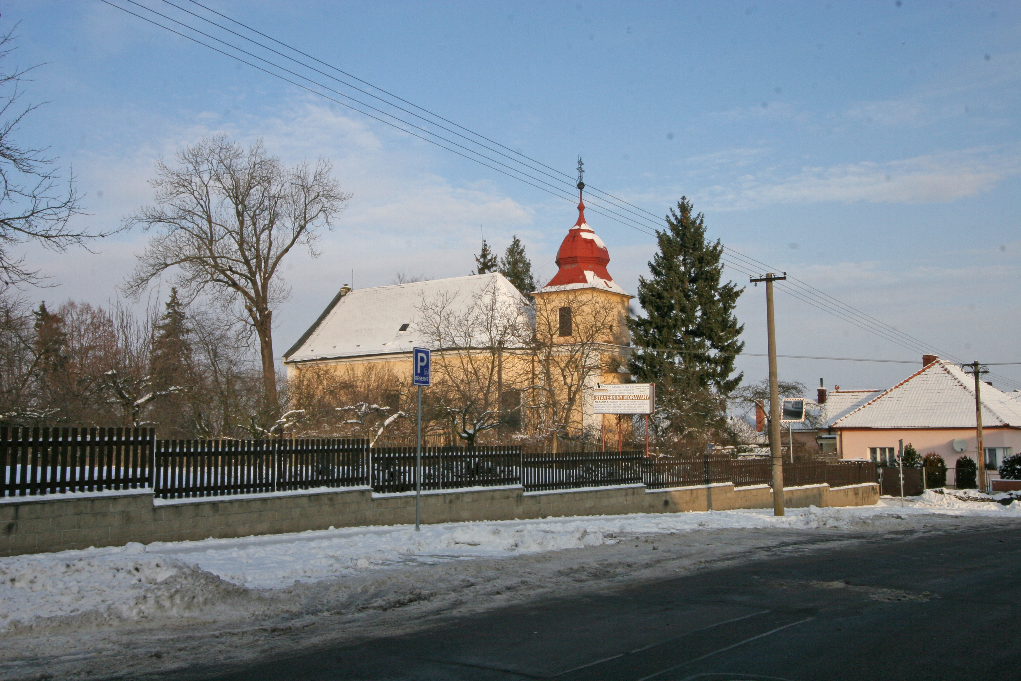 Kostel sv. Petra a Pavla (Moravany), střed obce, Moravany